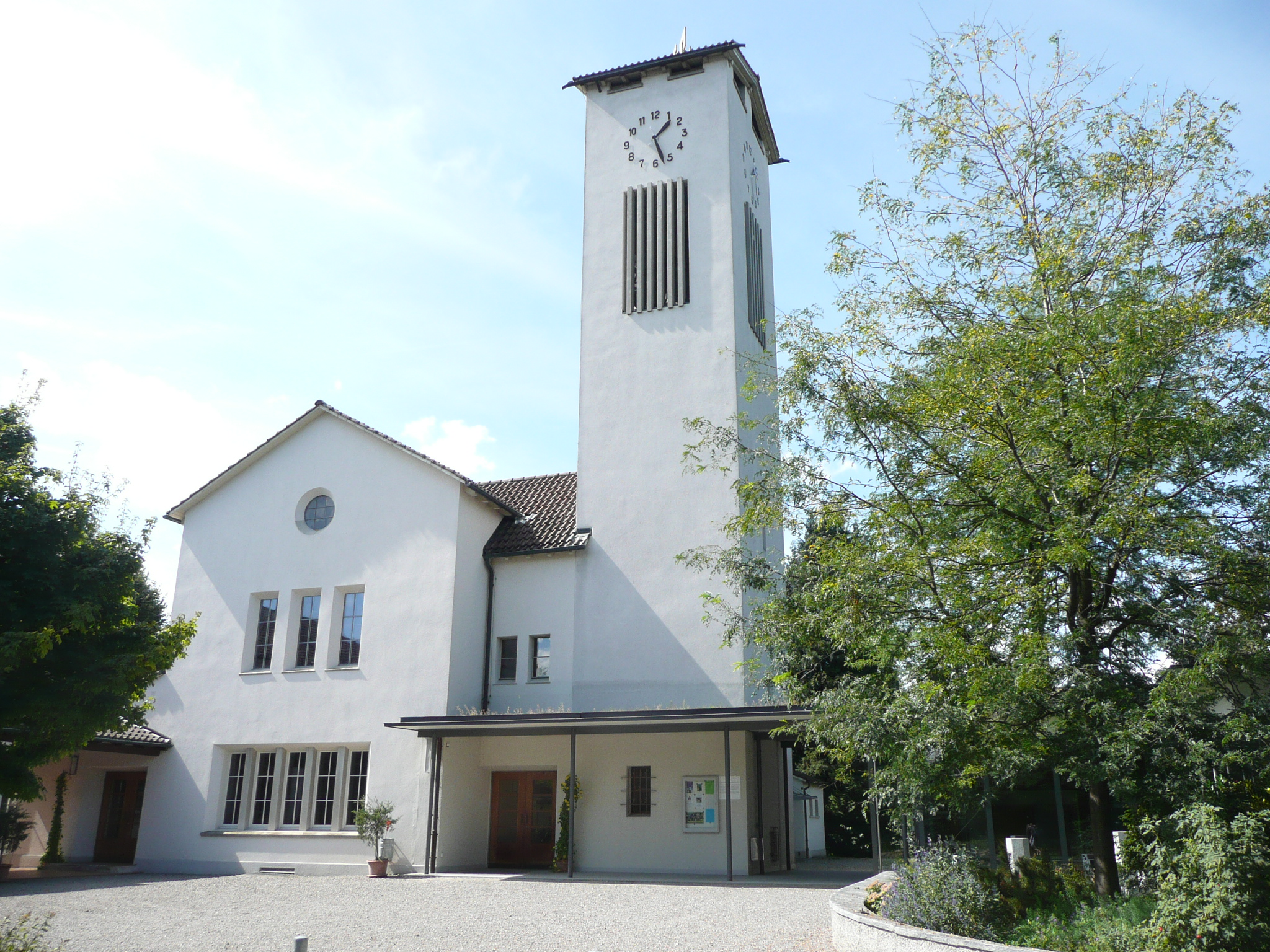 Evangelisches Kirchenzentrum Münchwilen TG (Schweiz), Baujahr der Kirche 1937